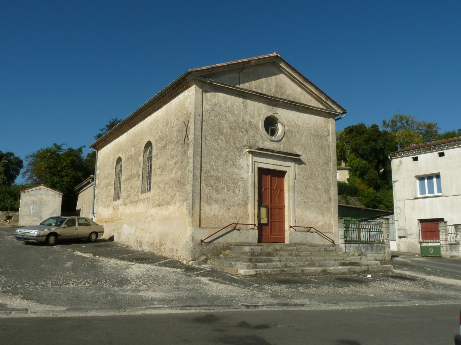 temple de Montendre (17), France.